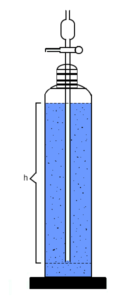 Schematische Zeichnung einer Andreasenpipette